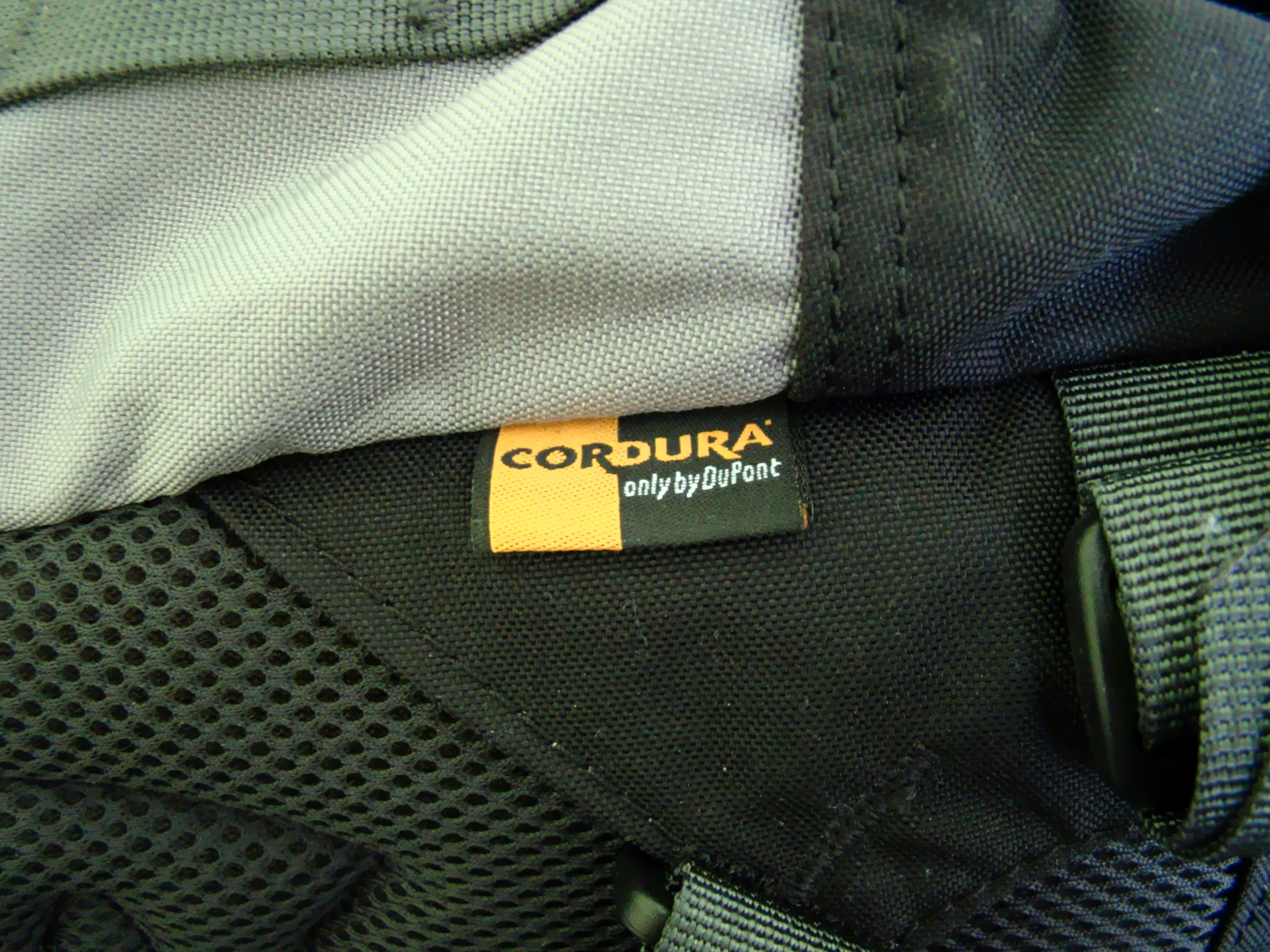 Zdjęcie metki świadczącej o oryginalności cordury z jakiej został wykonany plecak.